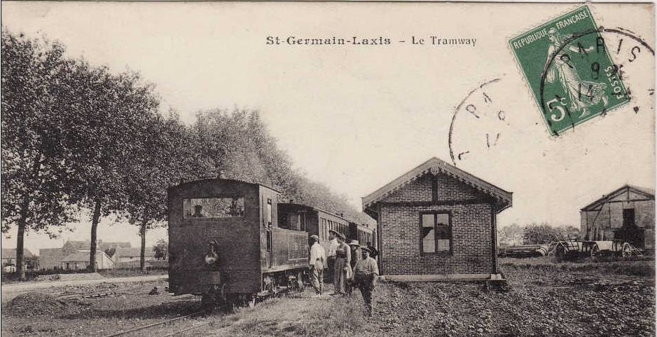 Une rame en gare de Saint-Germain-Laxis pris sous un autre angle.